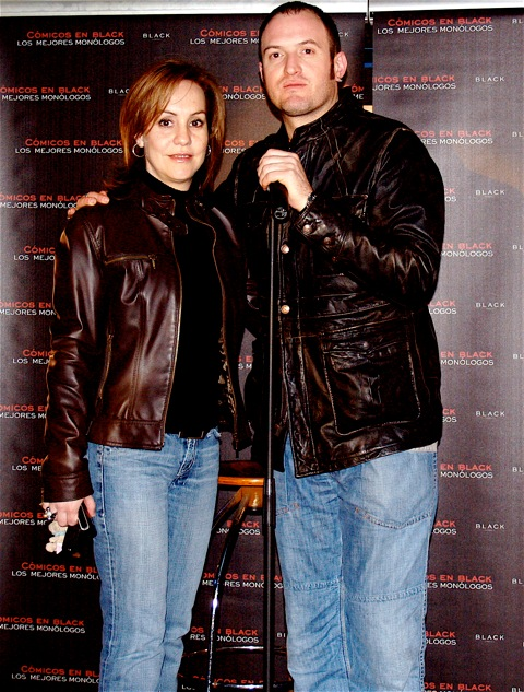 Imagen de la visita de Álex O'Dogherty a Black Cambrils